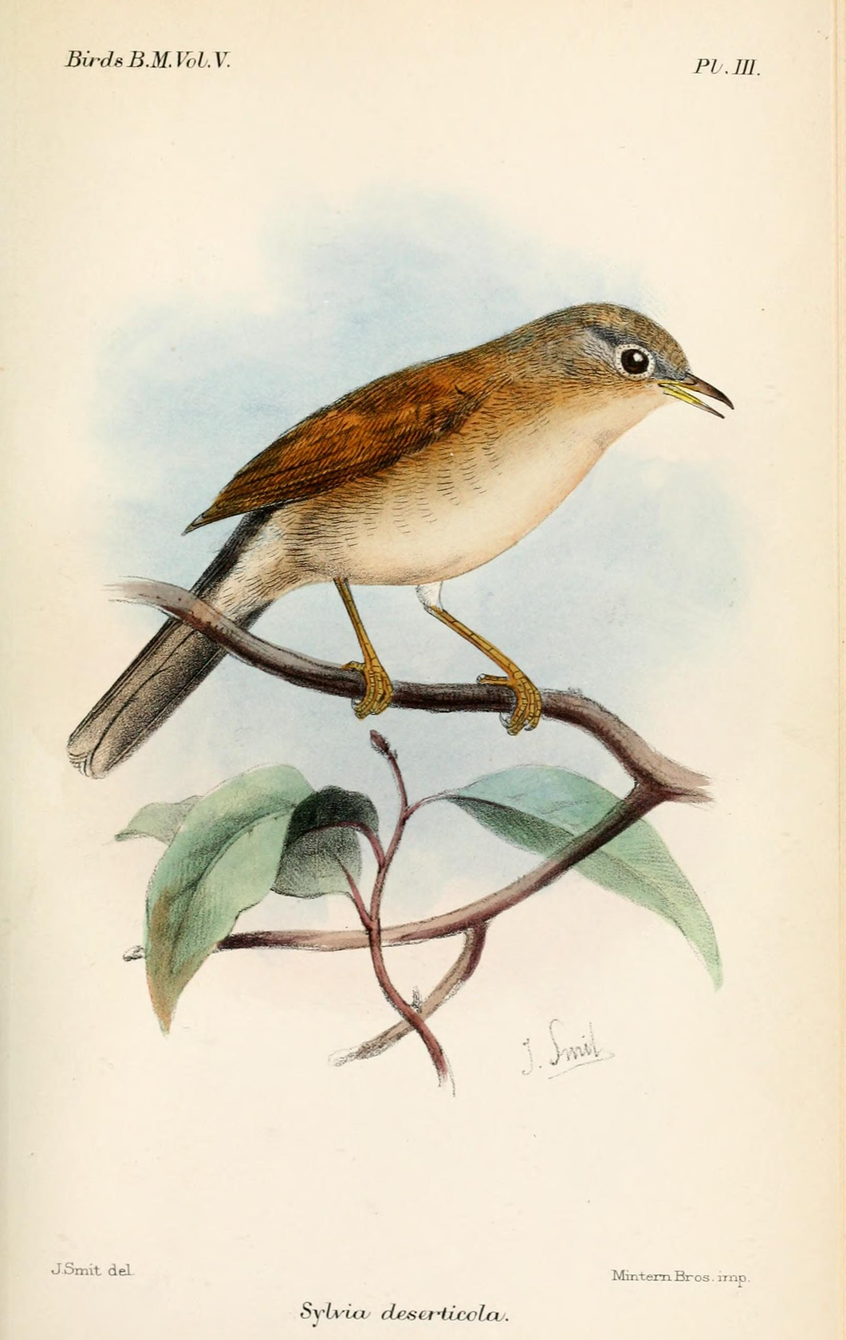 Sylvia deserticola, Tristram's Warbler